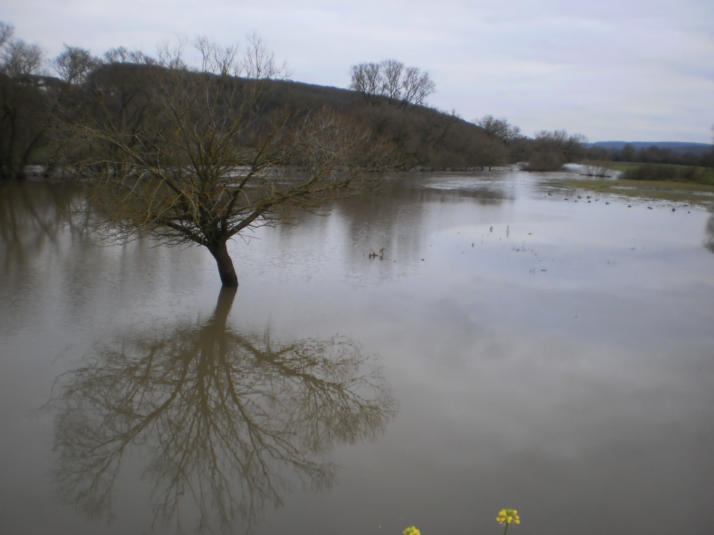 Das Hochwasser der Lahn im Lahntal zwischen Marburg und Gießen bei Weimar-Roth am 2. Dezember 2015.